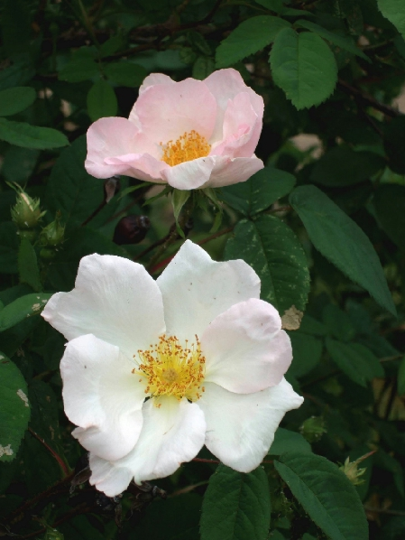 Rosa ×richardii